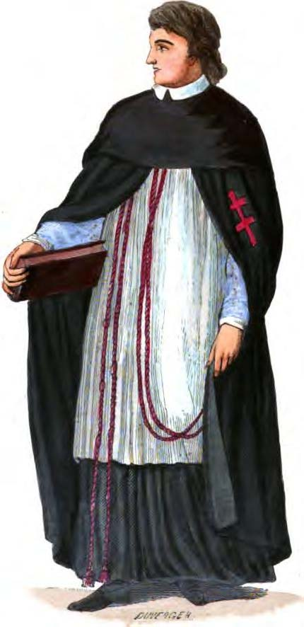 Chanoine de l'Ordre du Saint-Sépulcre. Gravure vers 1840.